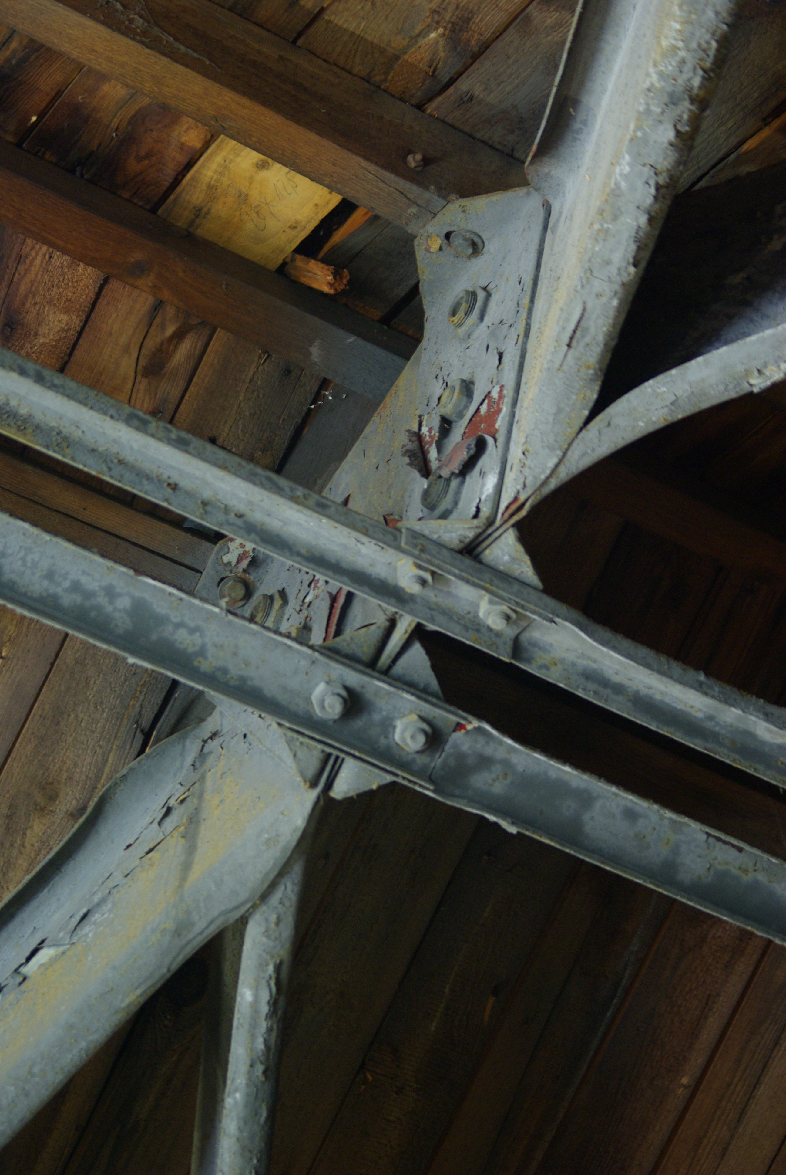 Stahllamellenkonstruktion im denkmalgeschützten Bootshaus der Junkers Paddelgemeinschaft